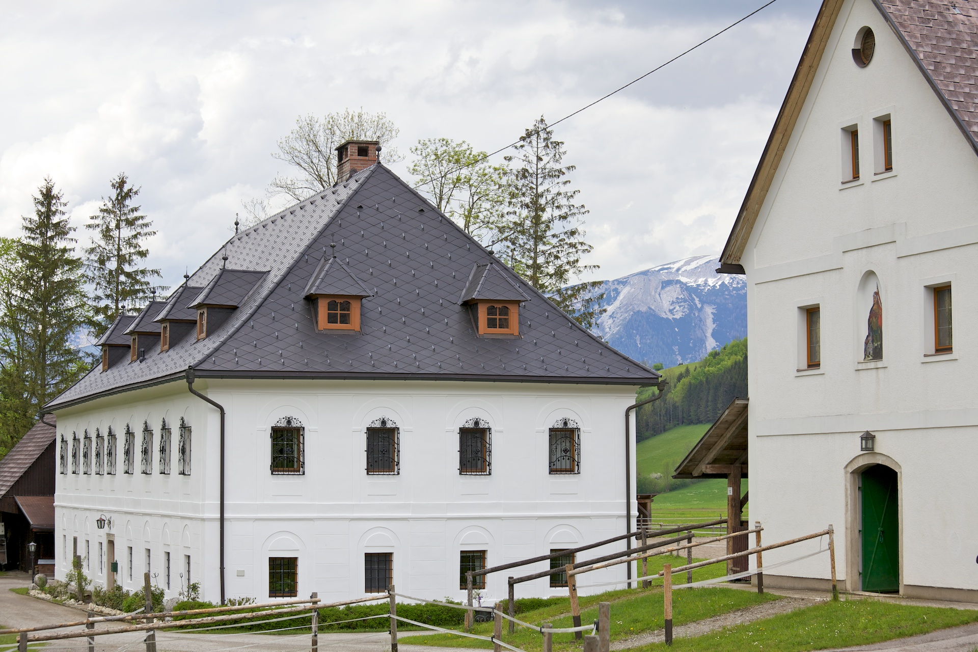 Herrenhaus, Schmied in der Au